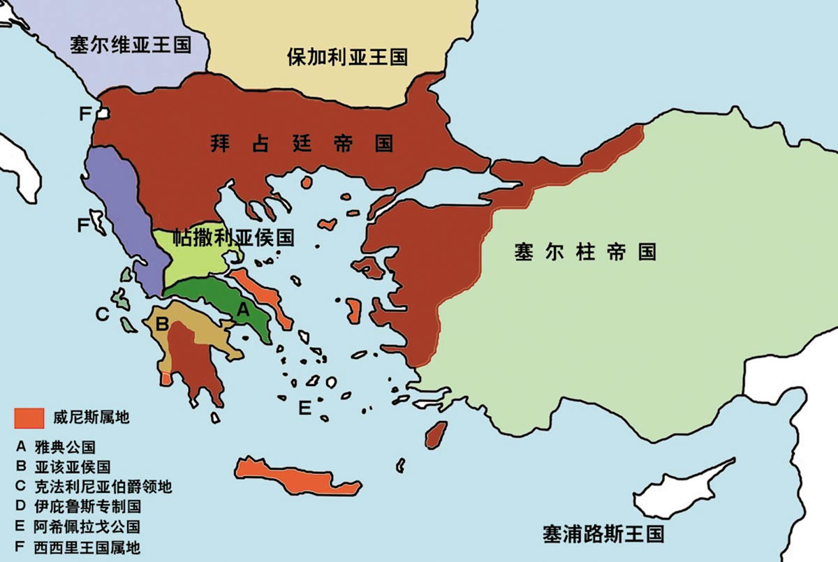 公元1265年时的zh:拜占庭帝国疆域